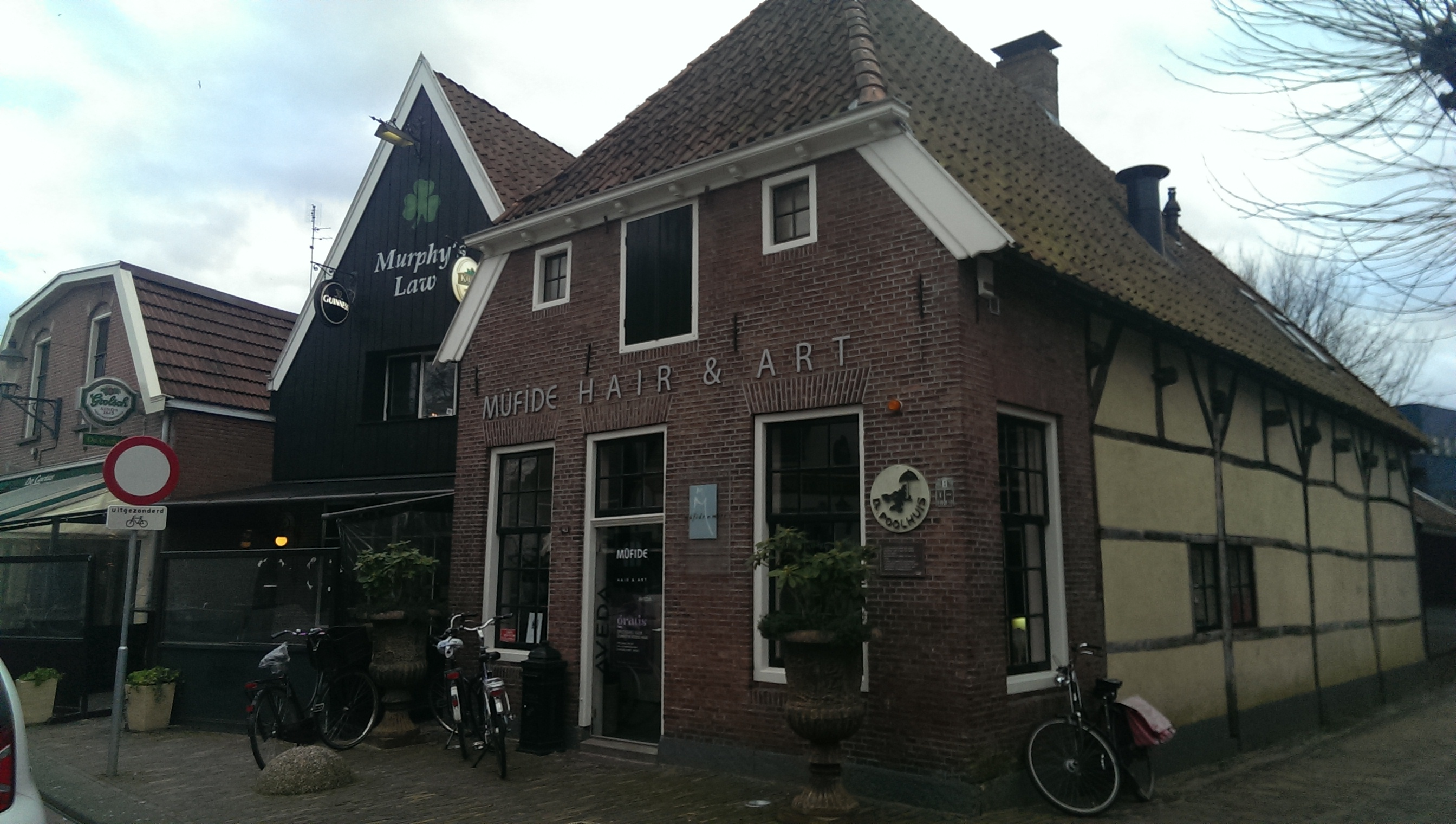 Dr. Poolhuis, Pastoriestraat 43, Hengelo